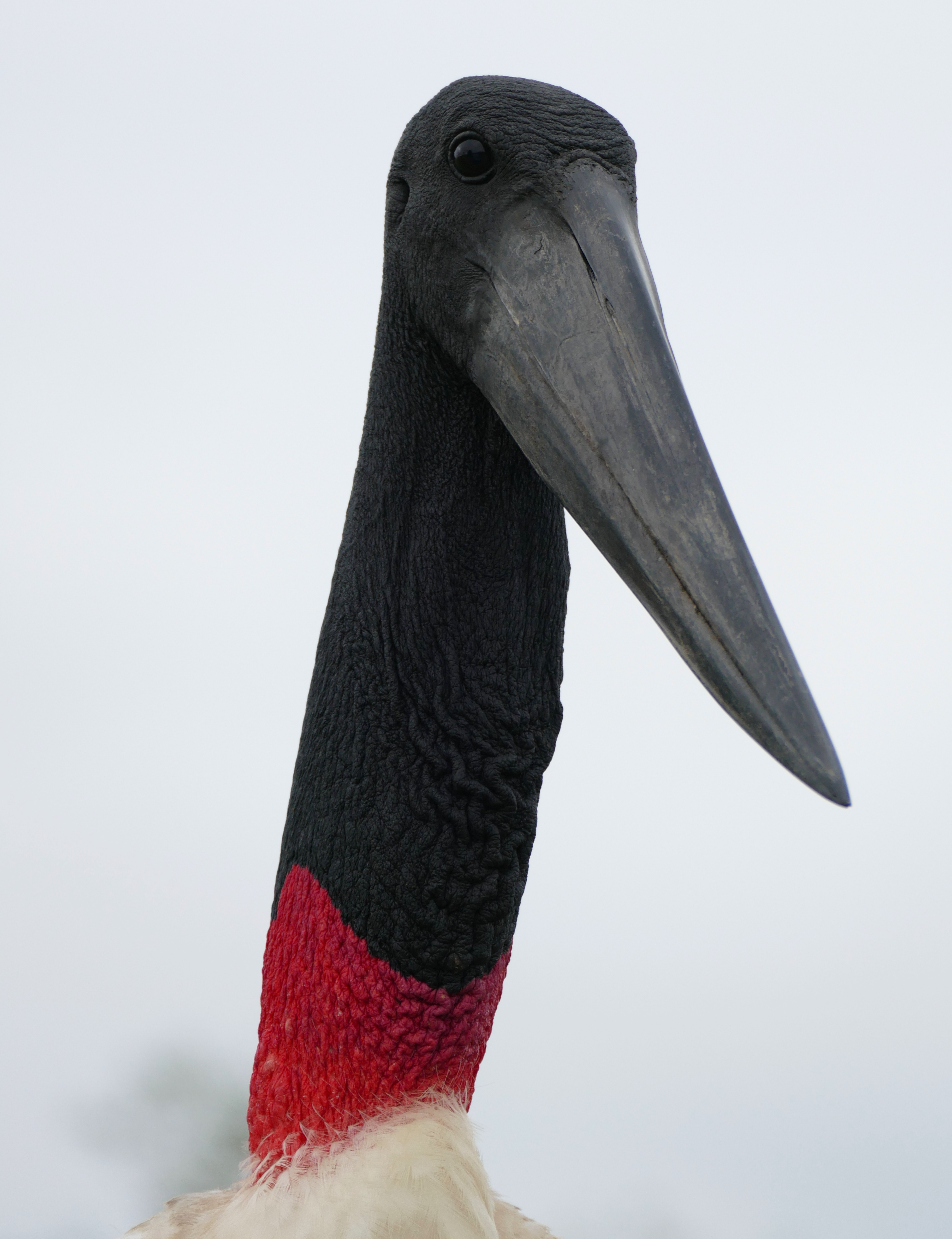 Pixaim River, Transpantaneira, Poconé, Mato Grosso, BRAZIL